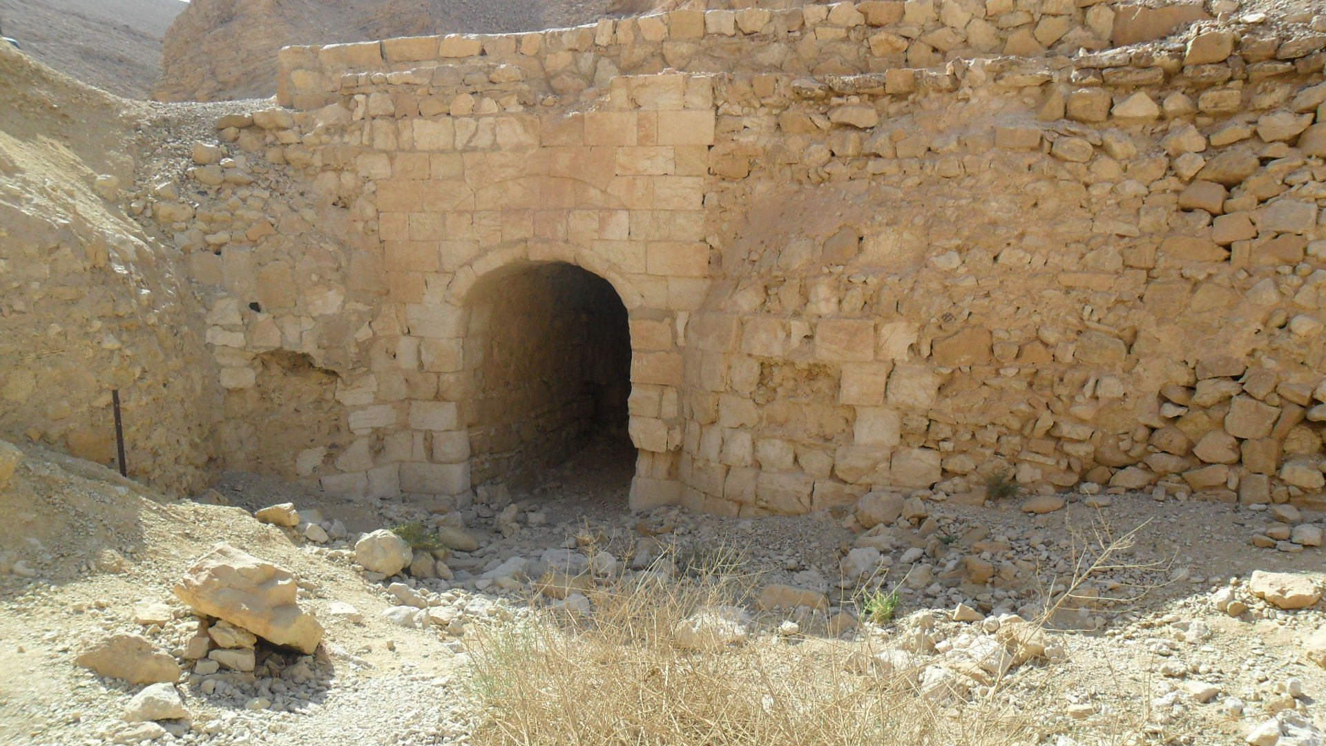 גשר ממלוכי על נחל שלמה